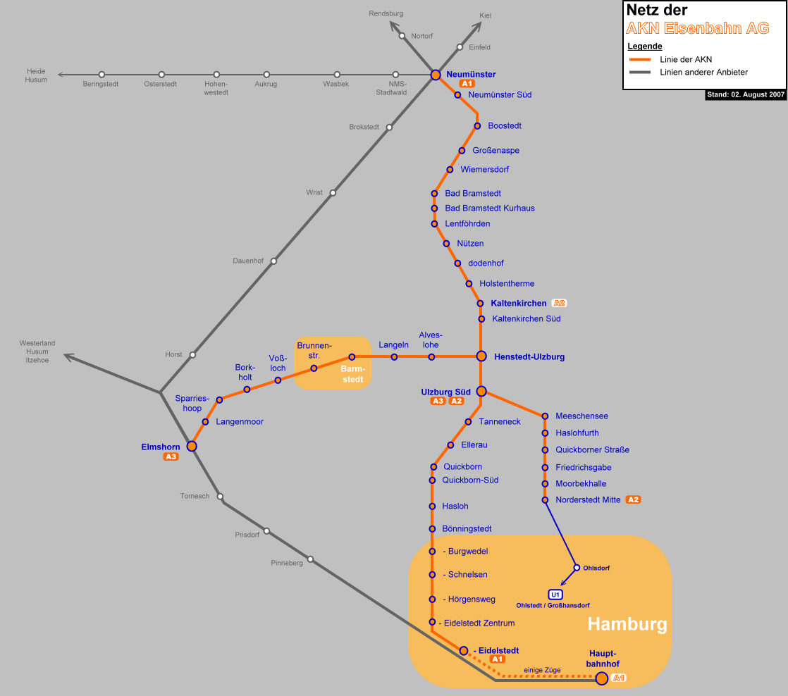 Netz der AKN Eisenbahn AG (2007, Verbindungen Schleswig-Holstein - Hamburg)